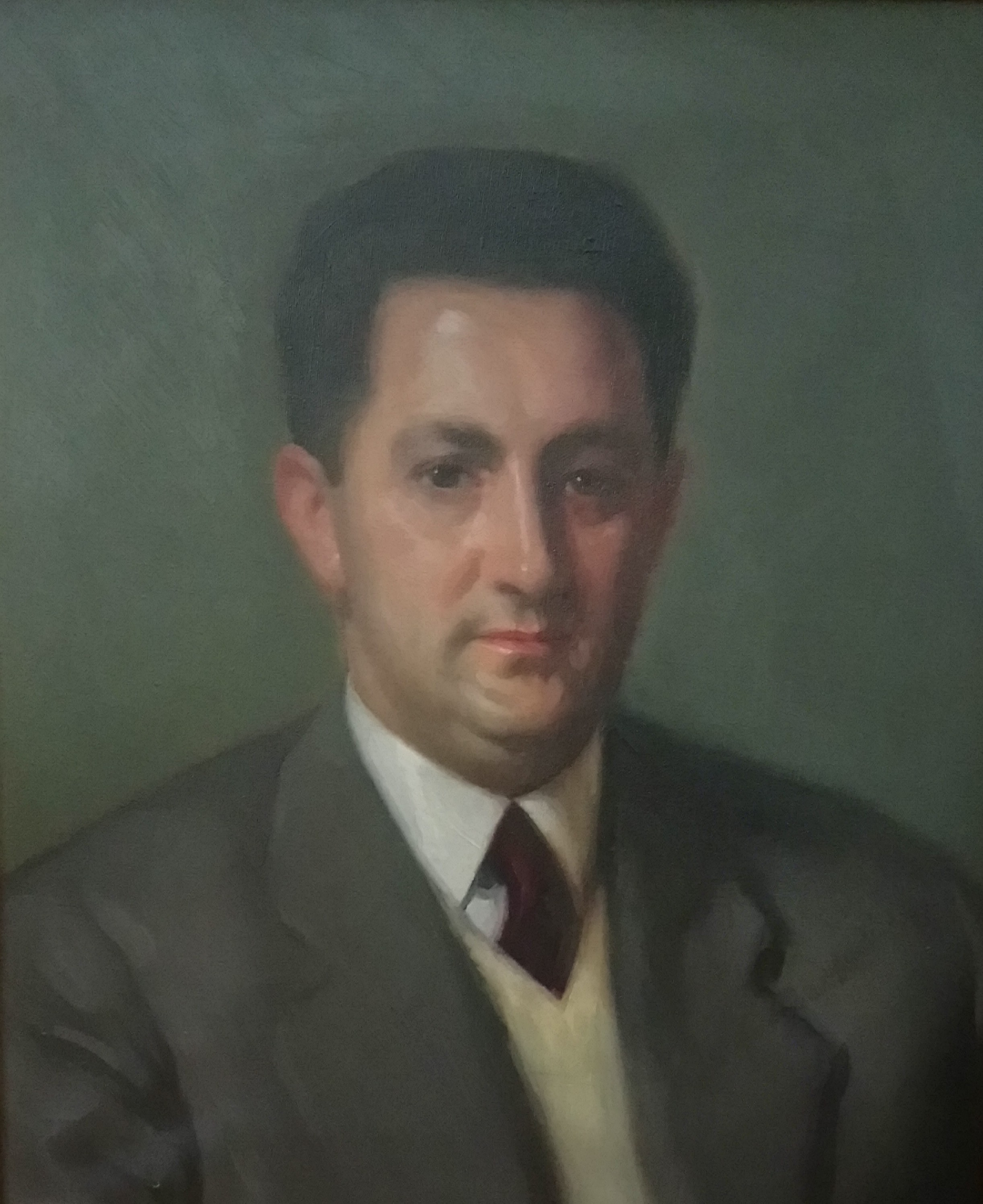 Retrato de Gonzalo Rico Avello por el pintor Fernando Briones